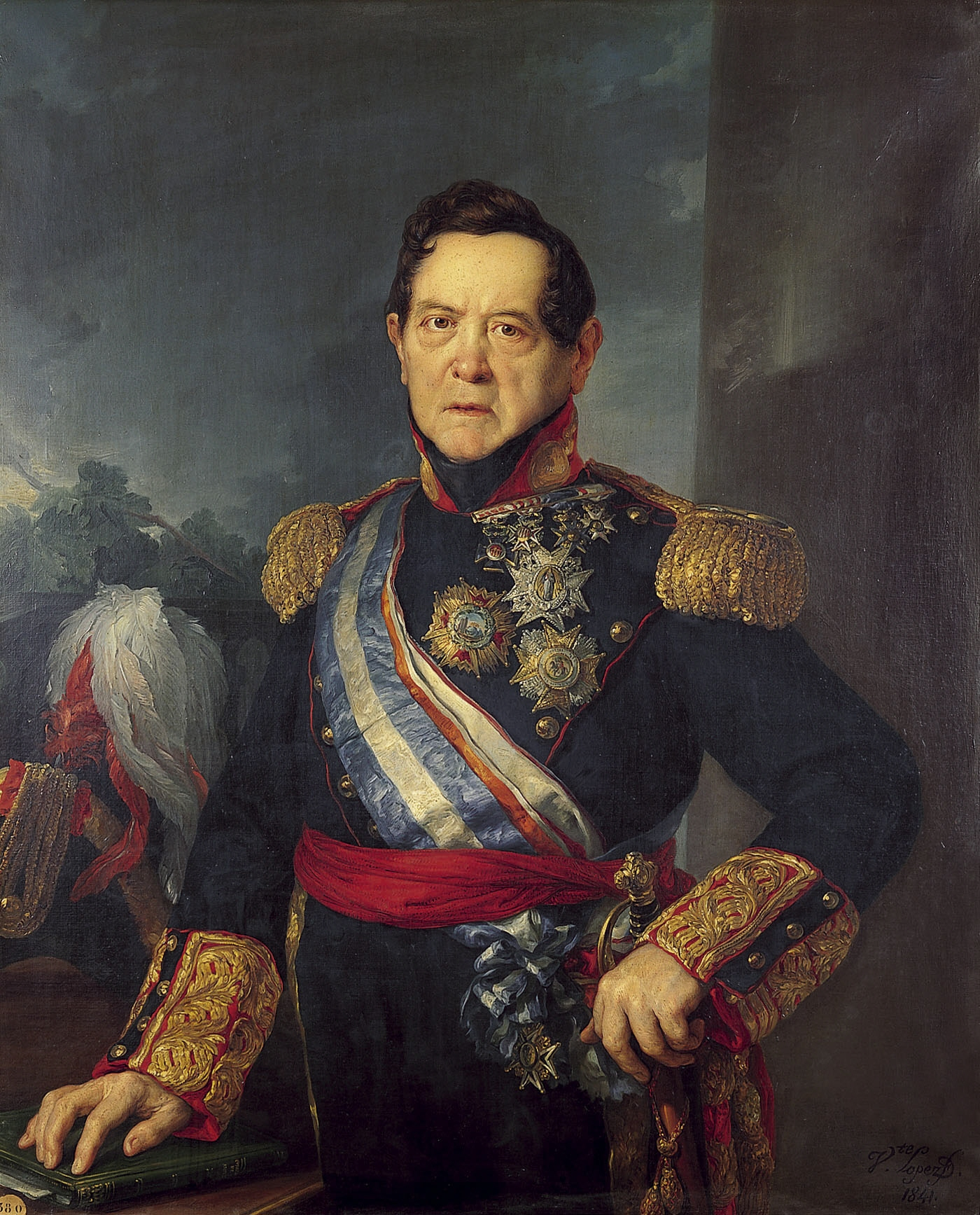 Retrato del teniente general Francisco Javier de Oms y de Santa Pau (1767-1842), que fue el V marqués de Castelldosríus. Aparece vestido con uniforme de teniente general de artillería y portando varias bandas y condecoraciones, como las grandes cruces de las órdenes de Carlos III, Isabel la Católica y San Hermenegildo. Y el cuadro fue cedido a la Real Academia de Bellas Artes de San Fernando por la viuda del marqués, que falleció en 1842, en el año 1863.